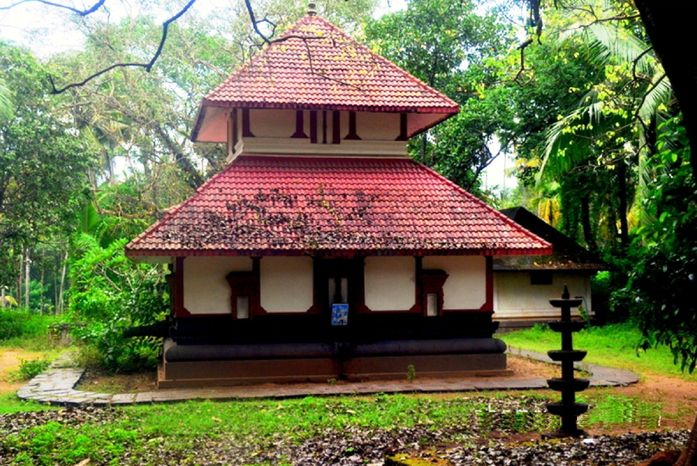 രവീശ്വരം മഹാദേവക്ഷേത്രം